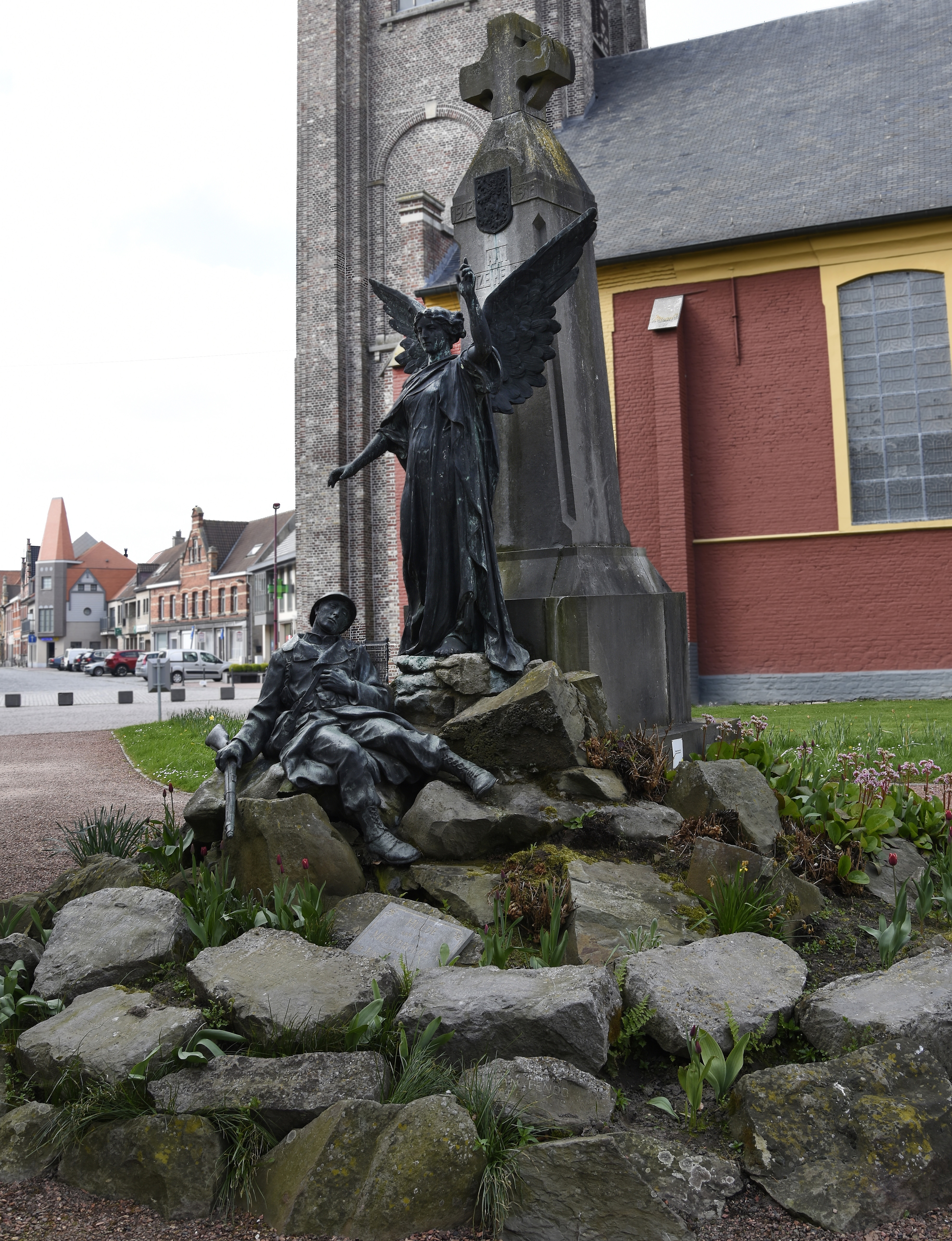 Oorlogsmonument door Aloïs De Beule te Ruiselede, België